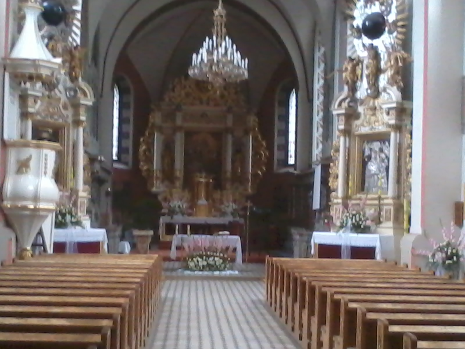 Kościół Wszystkich Świętych i św. Hieronima w Raciążku